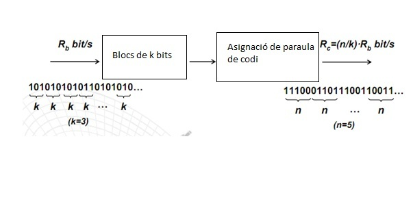 Gràfic de codi de blocs